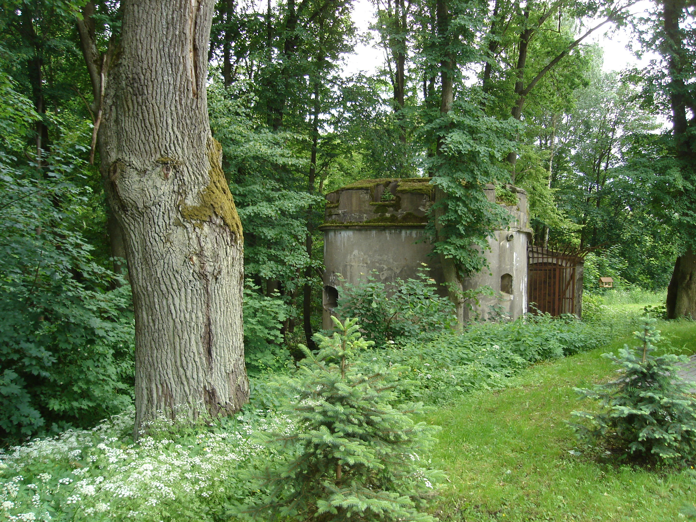 Bunkier koło kanału